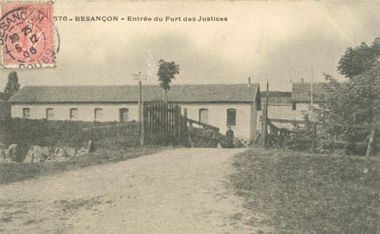 L'entrée du fort des Justices à Besançon, au début du XXe siècle/Entry of the fort des Justices in the french city of Besançon in the begining of 20th century.